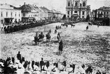 3 august 1919. Intrarea trupelor romane in Timisoara